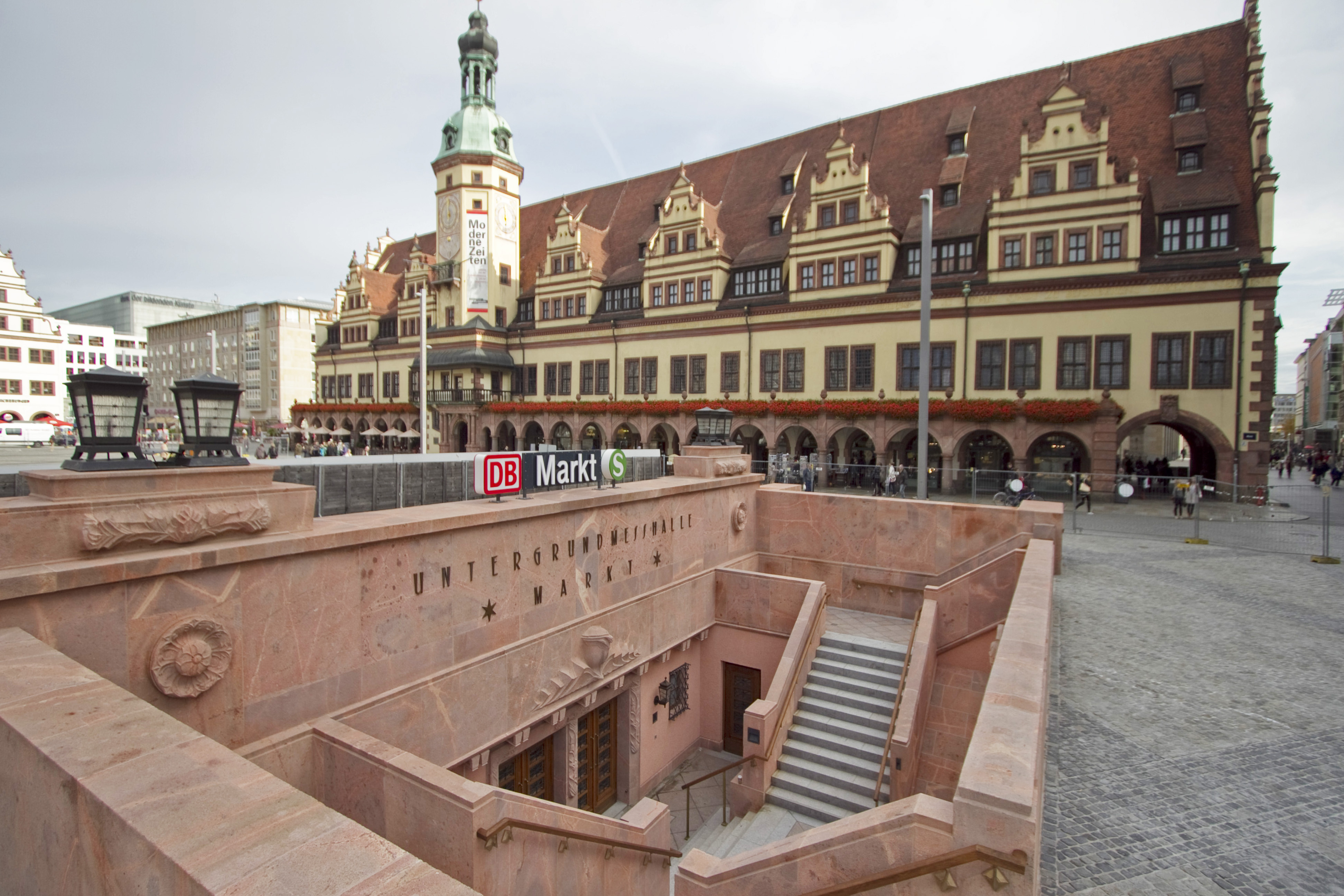 City-Tunnel Leipzig, Station Markt, Zugang Grimmaische Straße, historischer Zugang mit Innenschrift Untergrundmesshalle